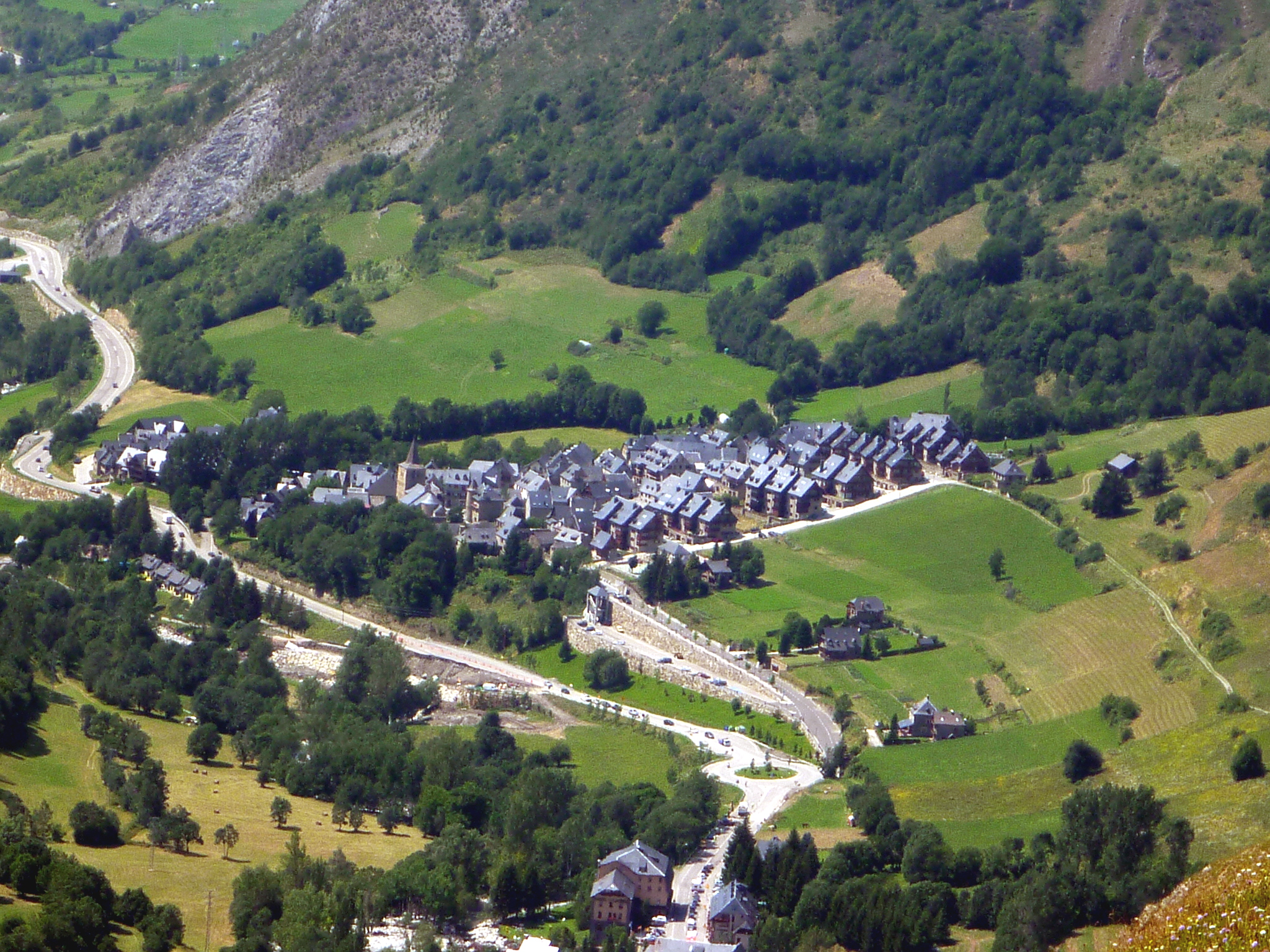 Gessa (Naut Aran)